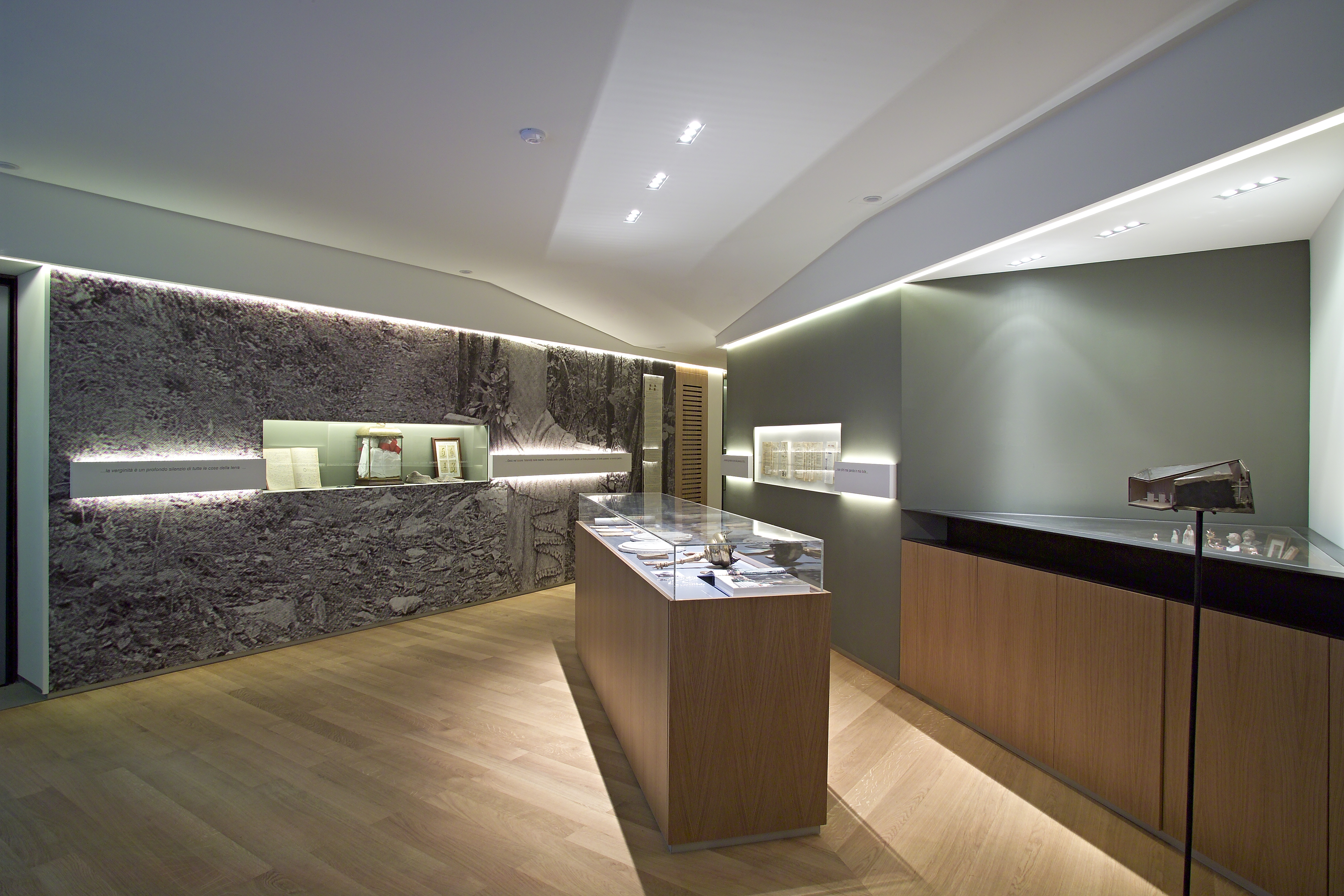 MBPM - Museo Beata Pierina Morosini, Fiobbio di Albino (Bg)